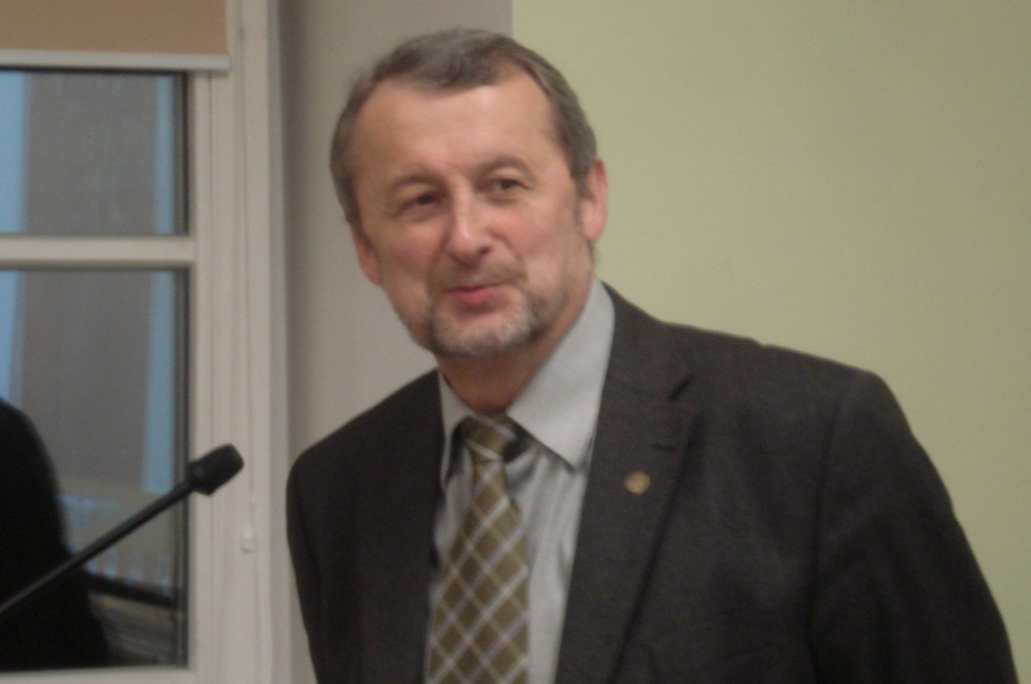 Арунас Грумадас (род. 1951), литовский физик, политический и общественный деятельLietuvių: Arūnas Grumadas (g. 1951), Lietuvos fizikas, politinis bei visuomenės veikėjas